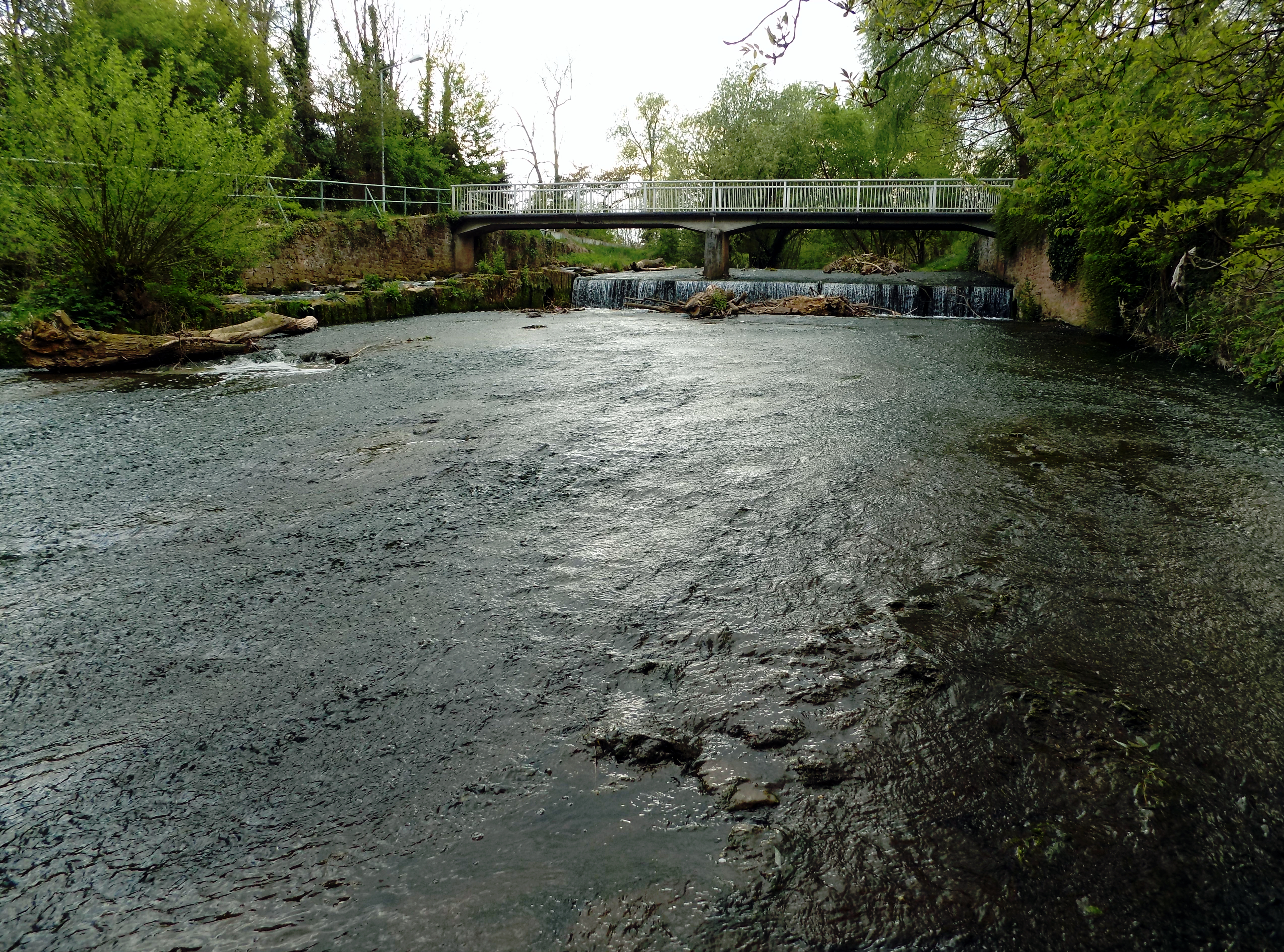 Die Pfrimm im Karl-Bittel-Park in Worms